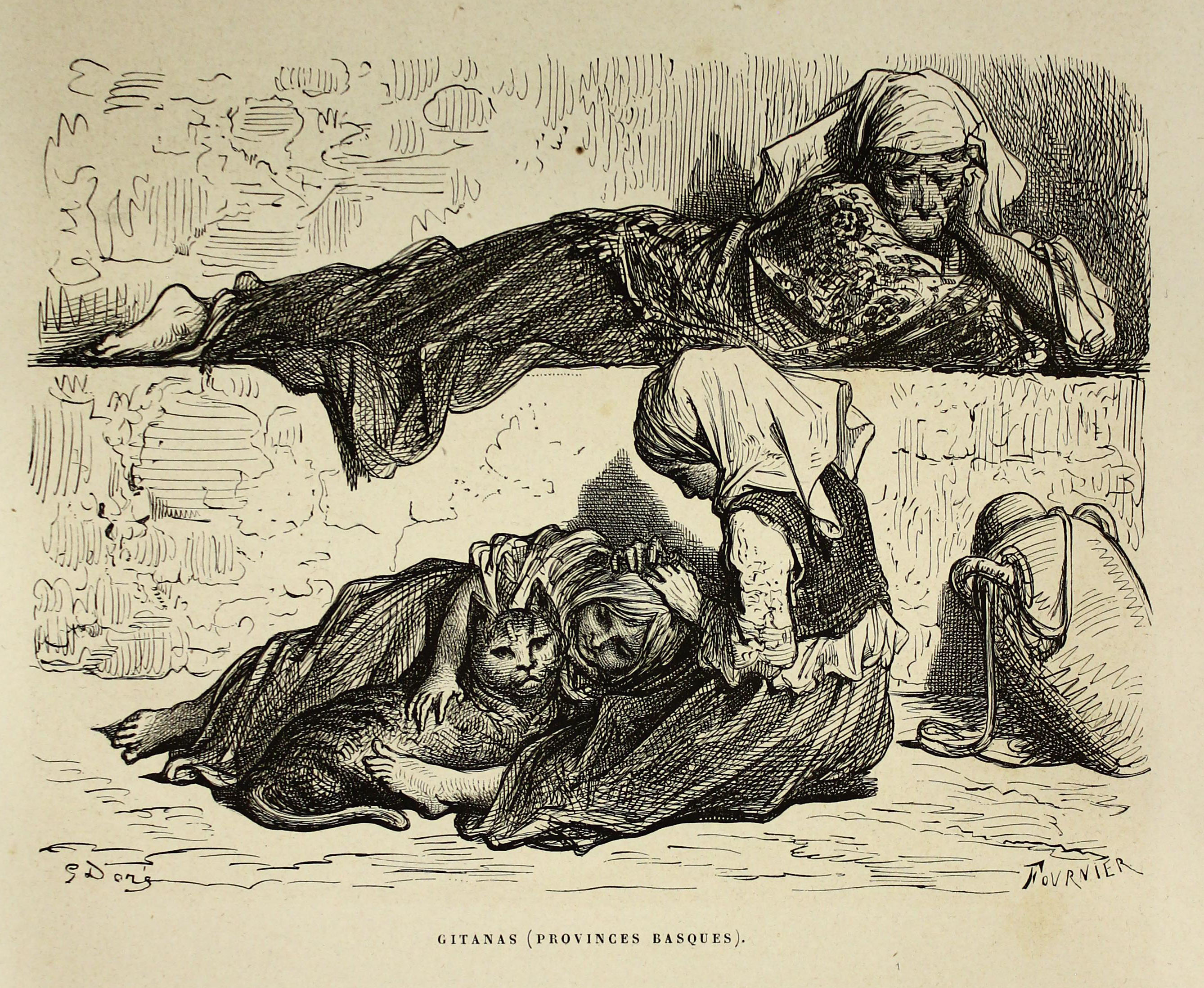 Autor: Davillier, Jean Charles, barón, 1823-1883 Descripción bibliográfica: L'Espagne / par Le Baron CH. Davillier ; ilustrée de 309 gravures dessinées su bois par Gustave Doré. - Paris : Librairie Hachette, 1874. - 799 p. : il. Materia: España- Geografía Materia: España- Usos y costumbres Ilustrador: Doré, Gustave, 1832-1883 Editor: Libreria Hachette Lugar de impresión: Francia, París Localización: Libro completo